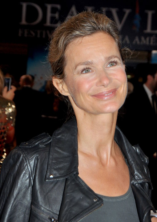 Marie-Sophie L. au festival du film américain de Deauville